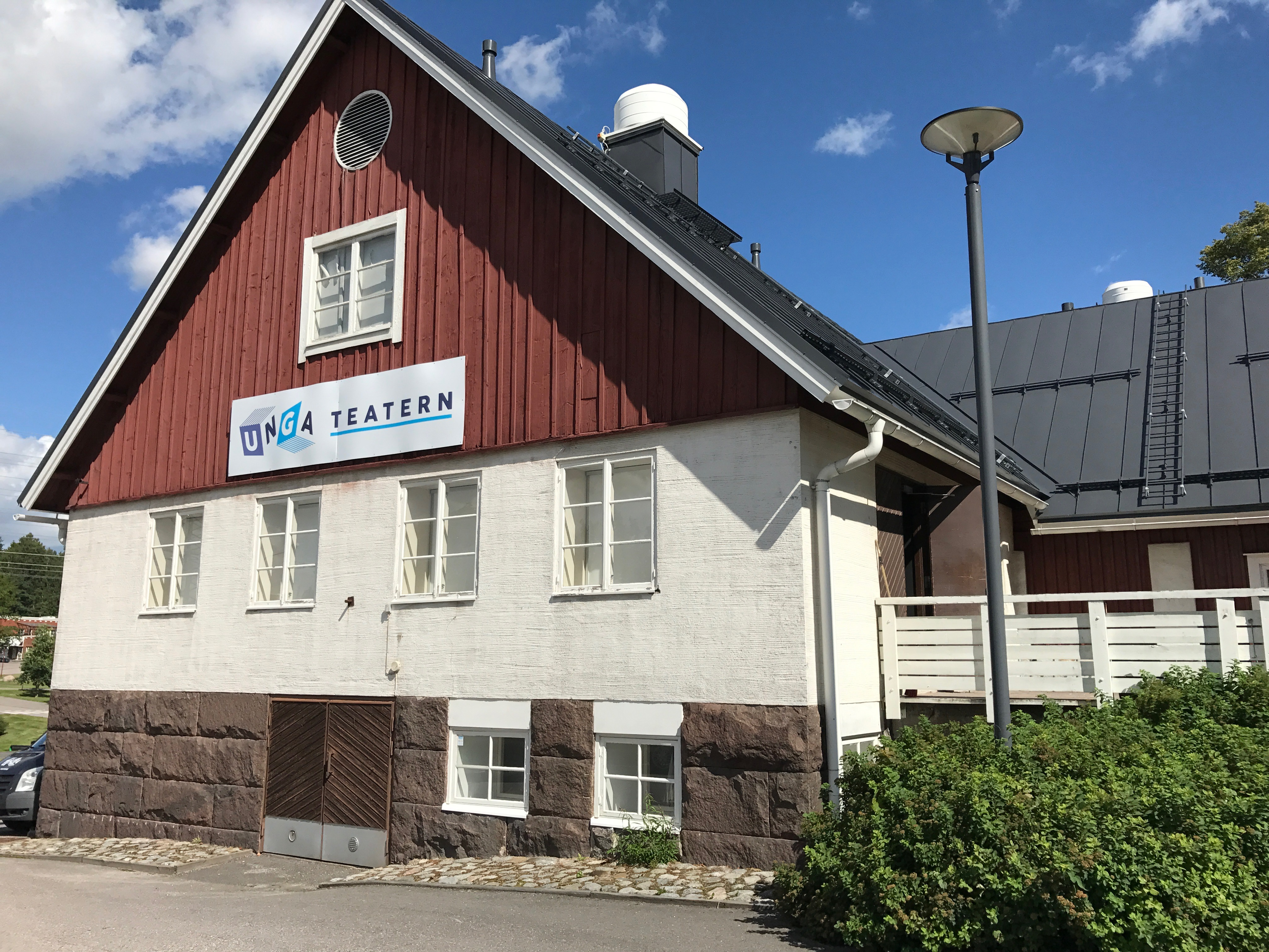 Unga Teatern Espoon Kilossa